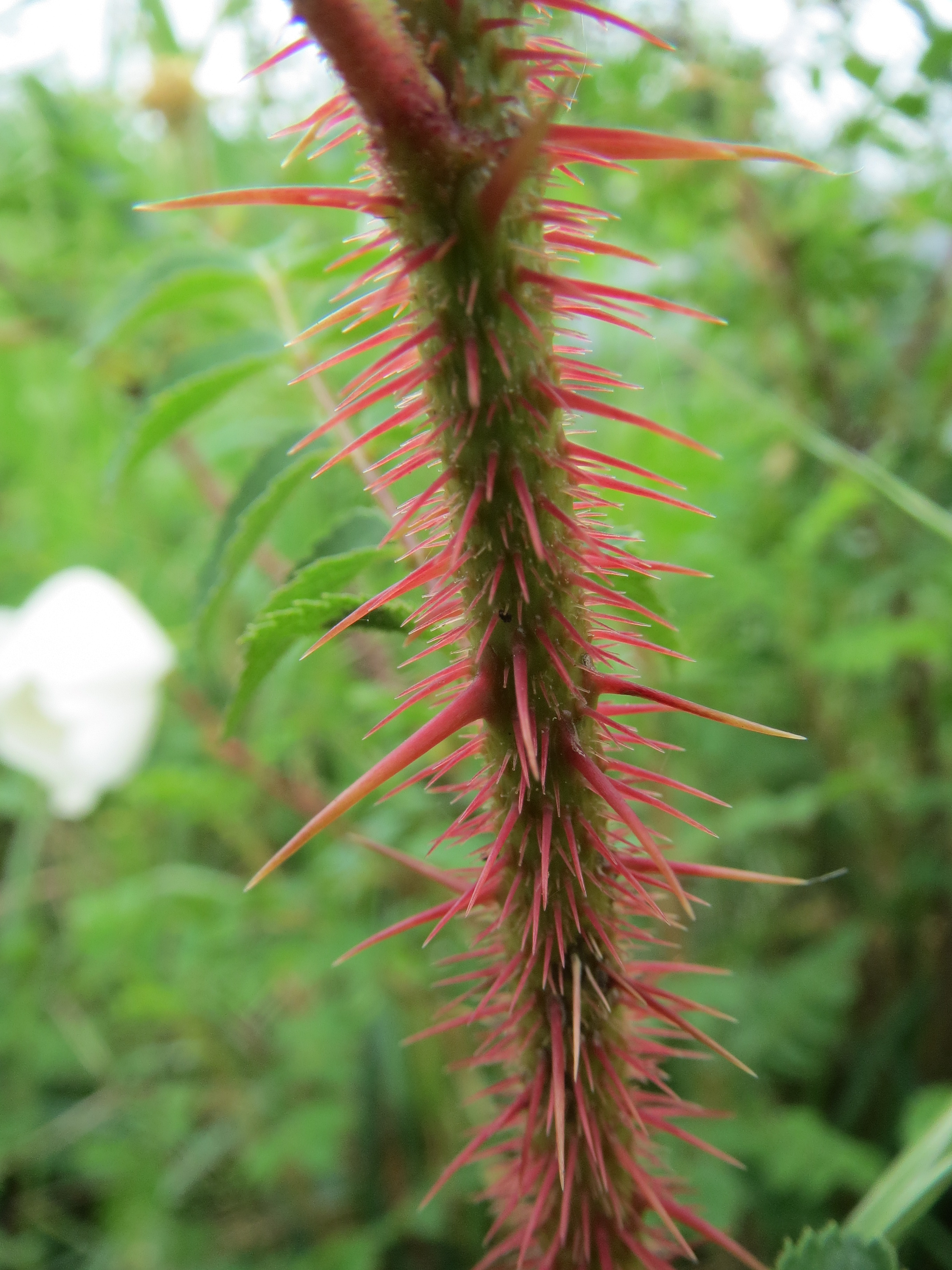 Bibernell-Rose (Rosa spinosissima) im Hockenheimer Rheinbogen